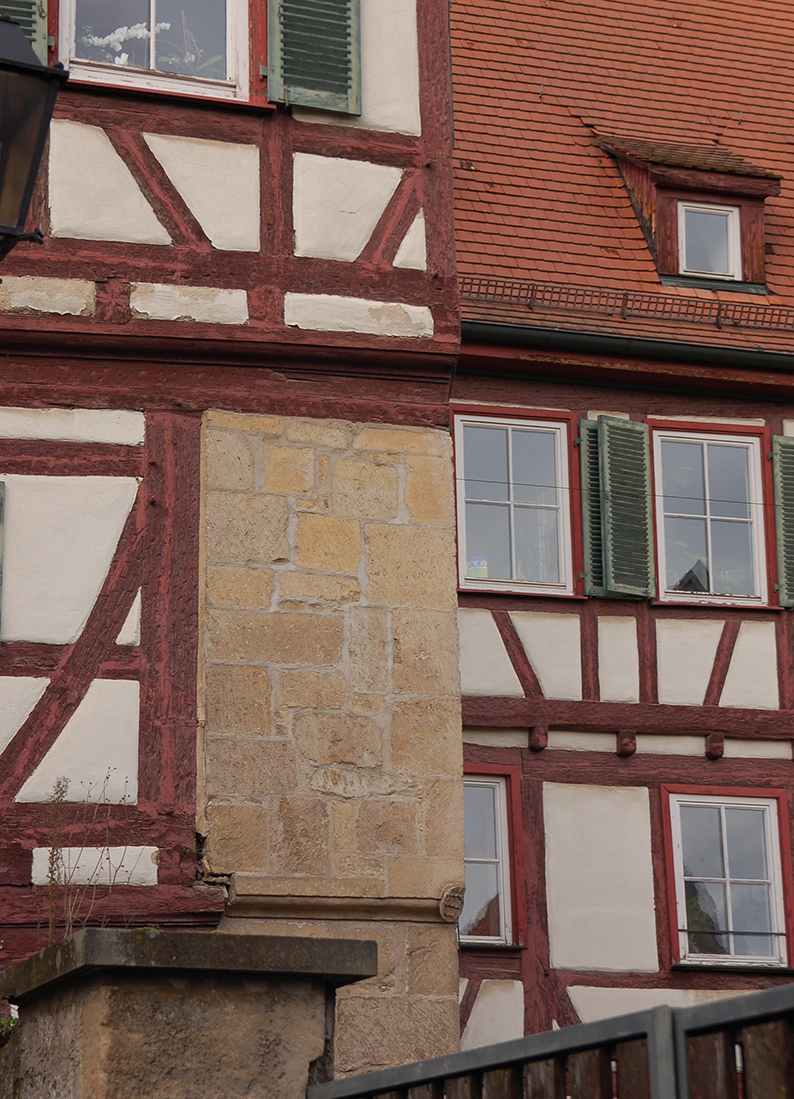 Steinernes Relikt des ehemaligen Herrenhofes am Pfarrhaus Markgröningen – mit vermutlich ältestem Württemberger Wappen der Grafen von Grüningen